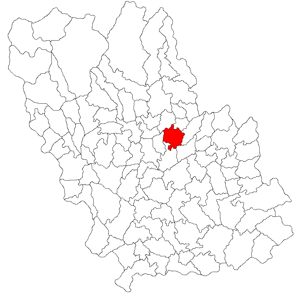 Categorie:Hărţi ale judeţului Prahova